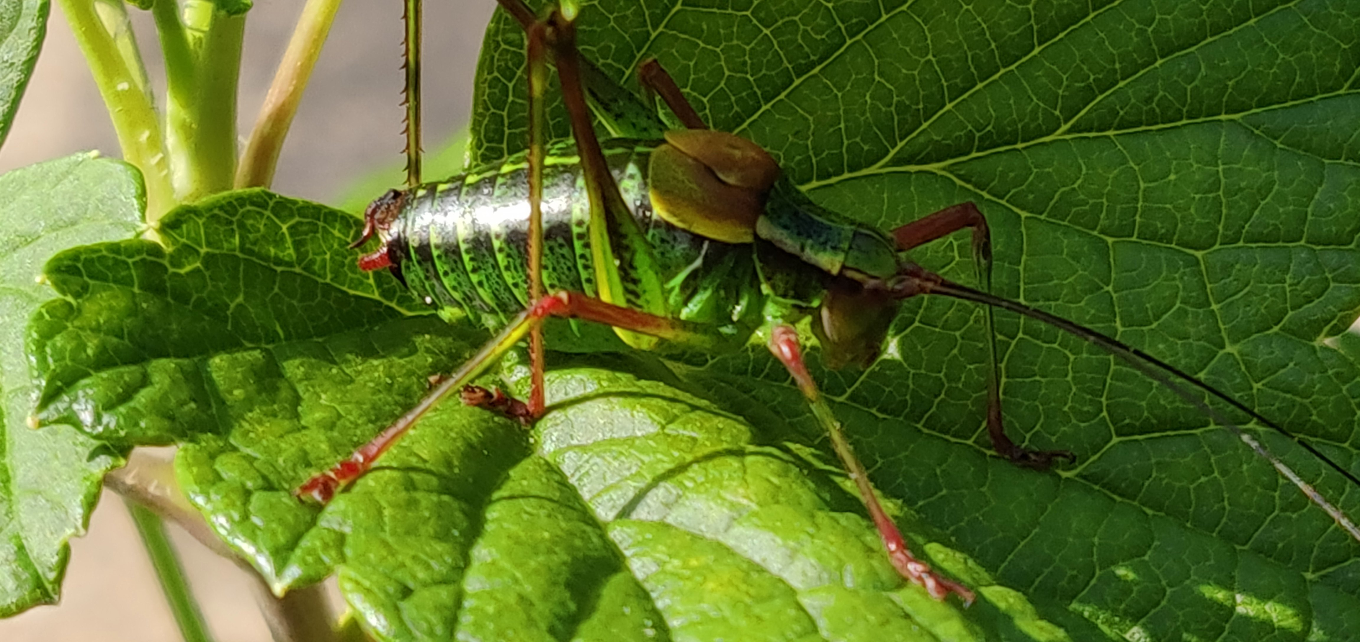 Strauchschrecke